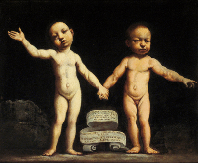 Portrait of the twins Ercole Gioseffo and Angiola Maria Riario Sforza.label QS:Len,"Portrait of the twins Ercole Gioseffo and Angiola Maria Riario Sforza."label QS:Lit,"Ritratto dei gemelli Ercole Gioseffo Riario Sforza e Angiola Maria Riario Sforza"